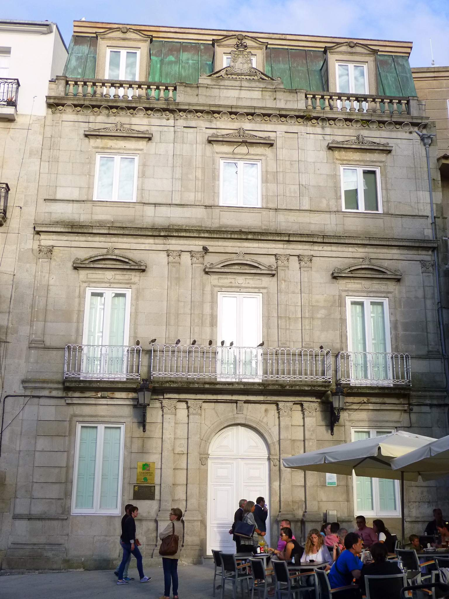 Vigo - Plaza de la Constitución, Casa Galega da Cultura (Antigo Concello)